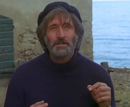 screenshot dal film Quella età maliziosa (1975)